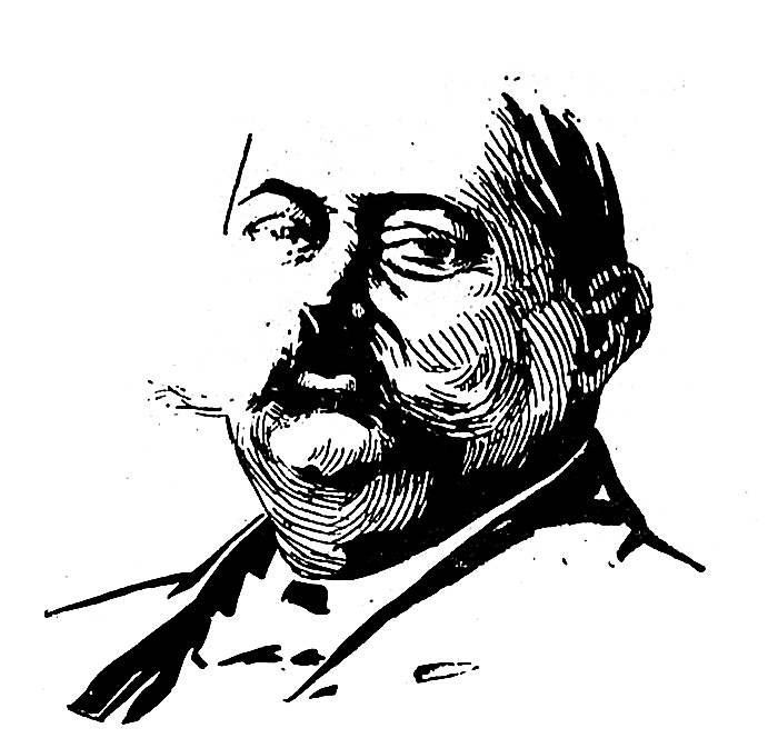 Caricatura do poeta brasileiro Emílio de Meneses, por Calixto.